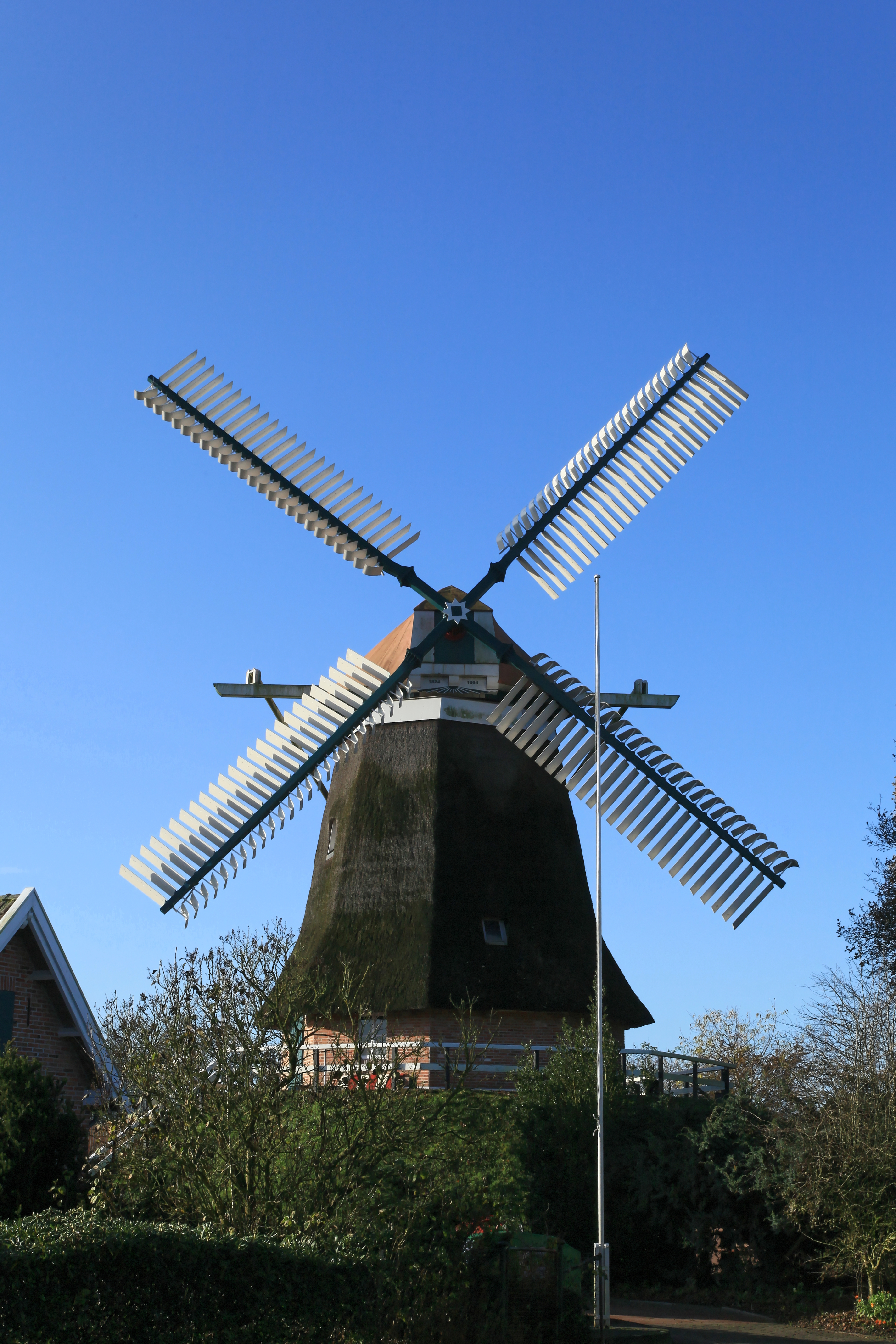 Burlager Mühle, Landesstraße in Rhauderfehn